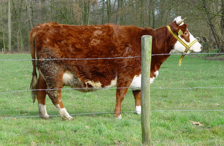 Groninger Blaarkop Roodblaar hoogdrachtig Eigen foto van eigen blaarkopkoe. Groninger Blaarkop